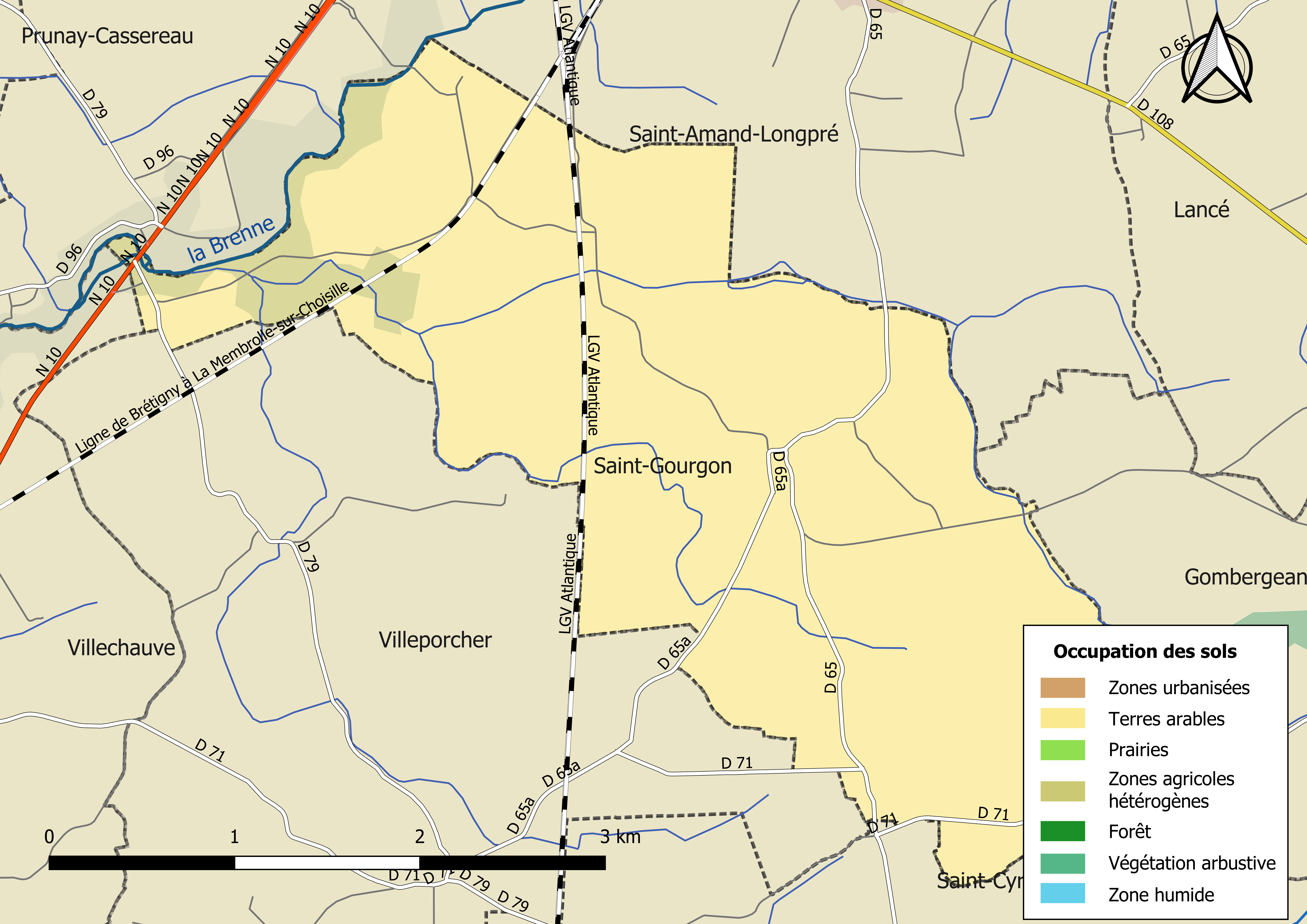 Carte des infrastructures et de l’occupation des sols en 2018 de la commune de Saint-Gourgon (France).